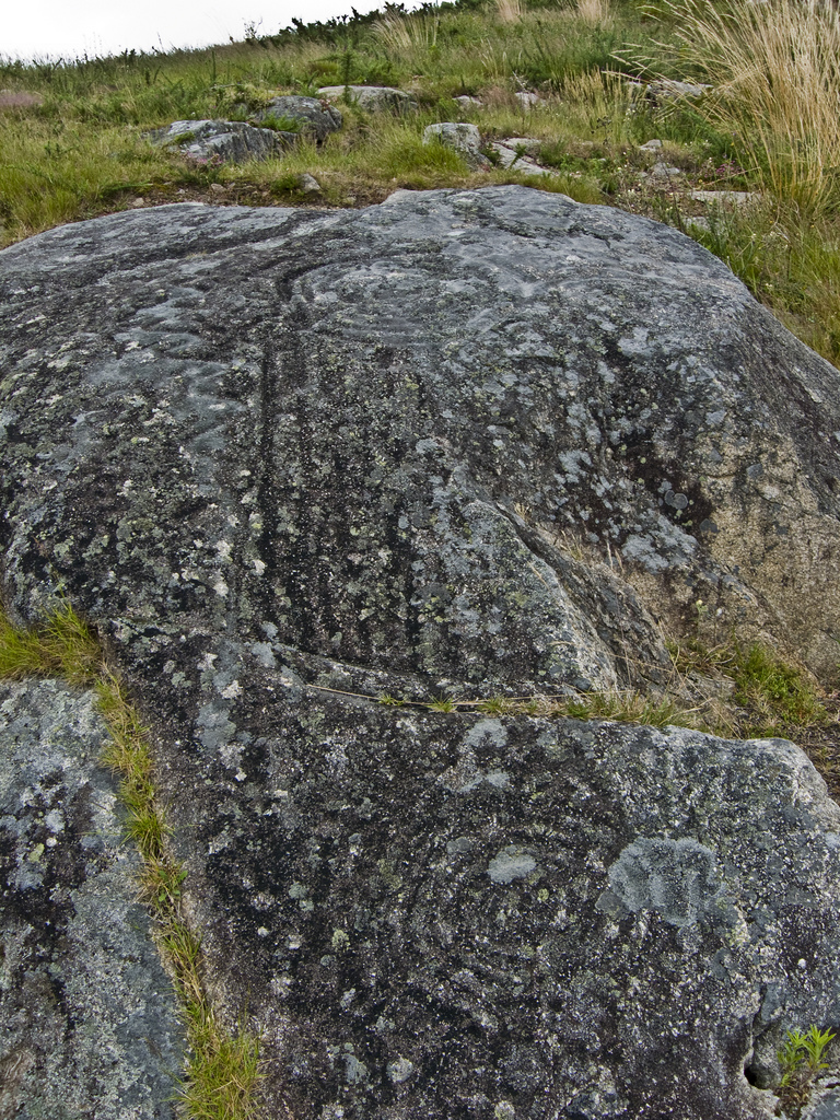 Esta foto participó en el juego En un Lugar de Flickr Calco: TURISTICAS/PANEIS INTERPRETATIVOS RUTA HISTORICA/Petroglifo_Pedra_das_serpes.pdf